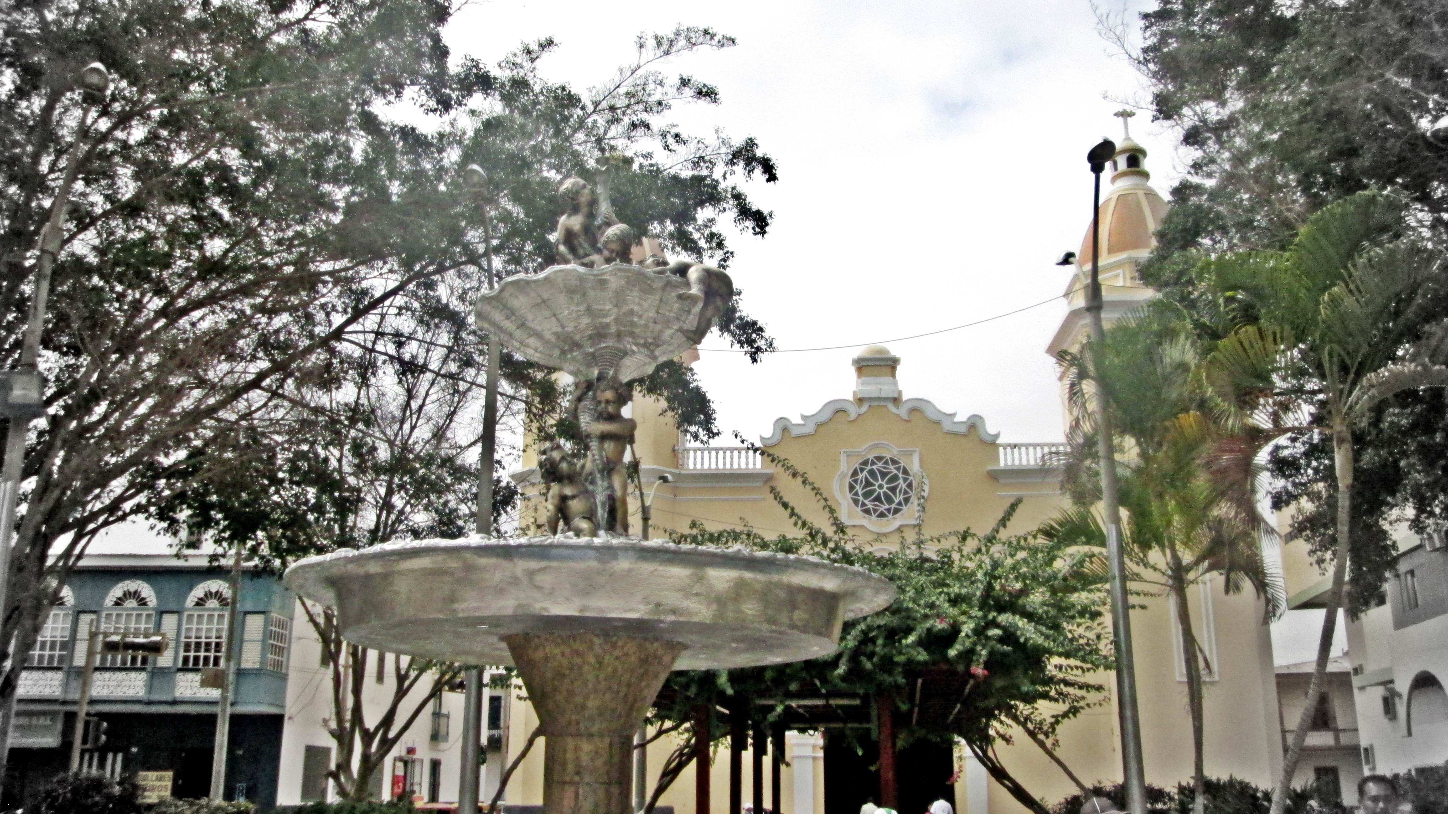 Plaza de la ciudad de Paita.